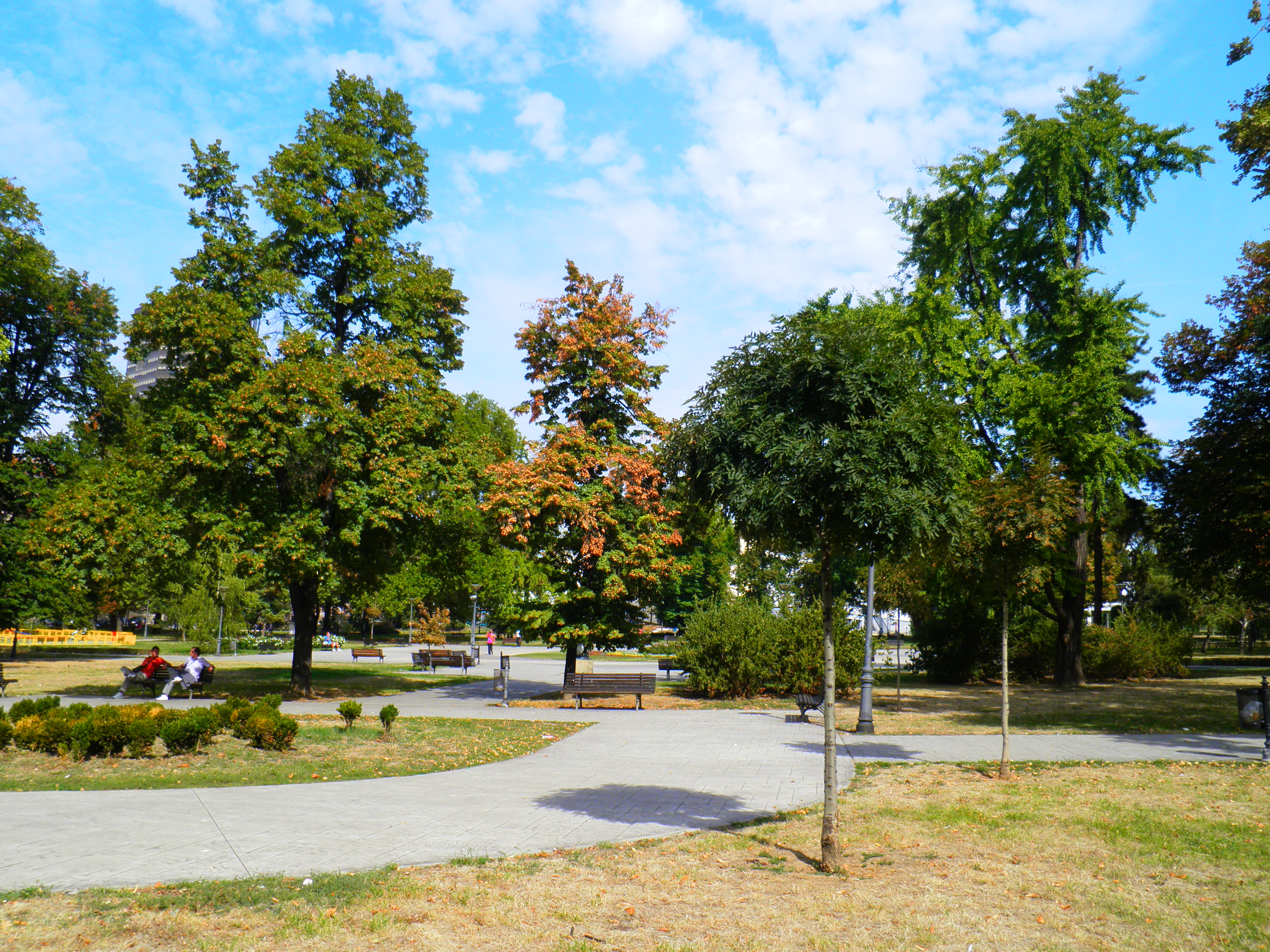 Park Manjež